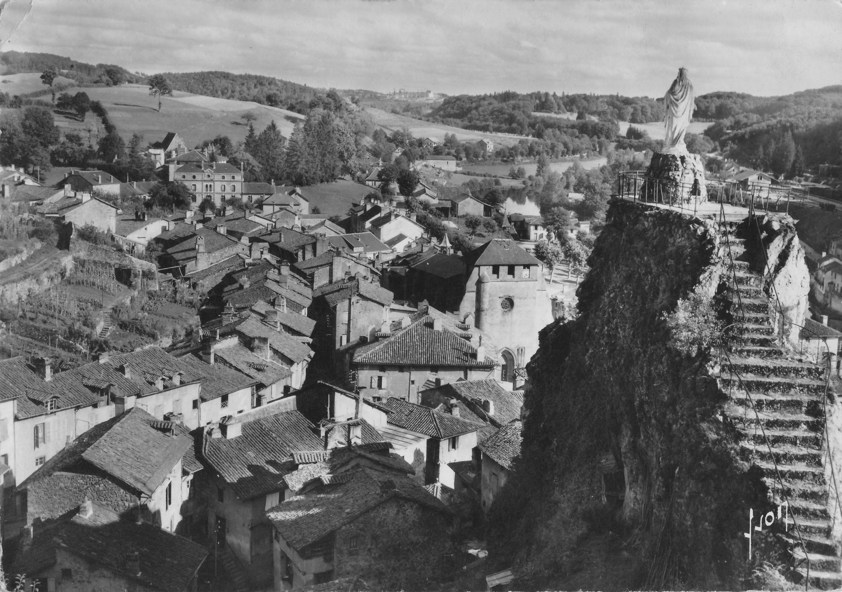 Carte postale ancienne montrant la ville de Laroquebrou vers 1953